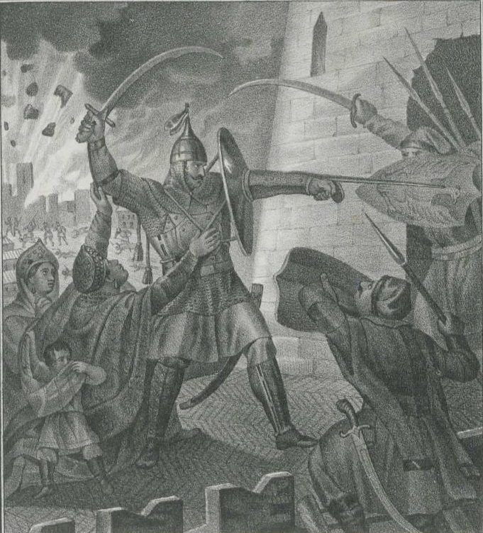 The Siege of Smolensk by the Poles. Оборона Смоленска от поляков / Оборона Смоленска в 1609-1611 годах